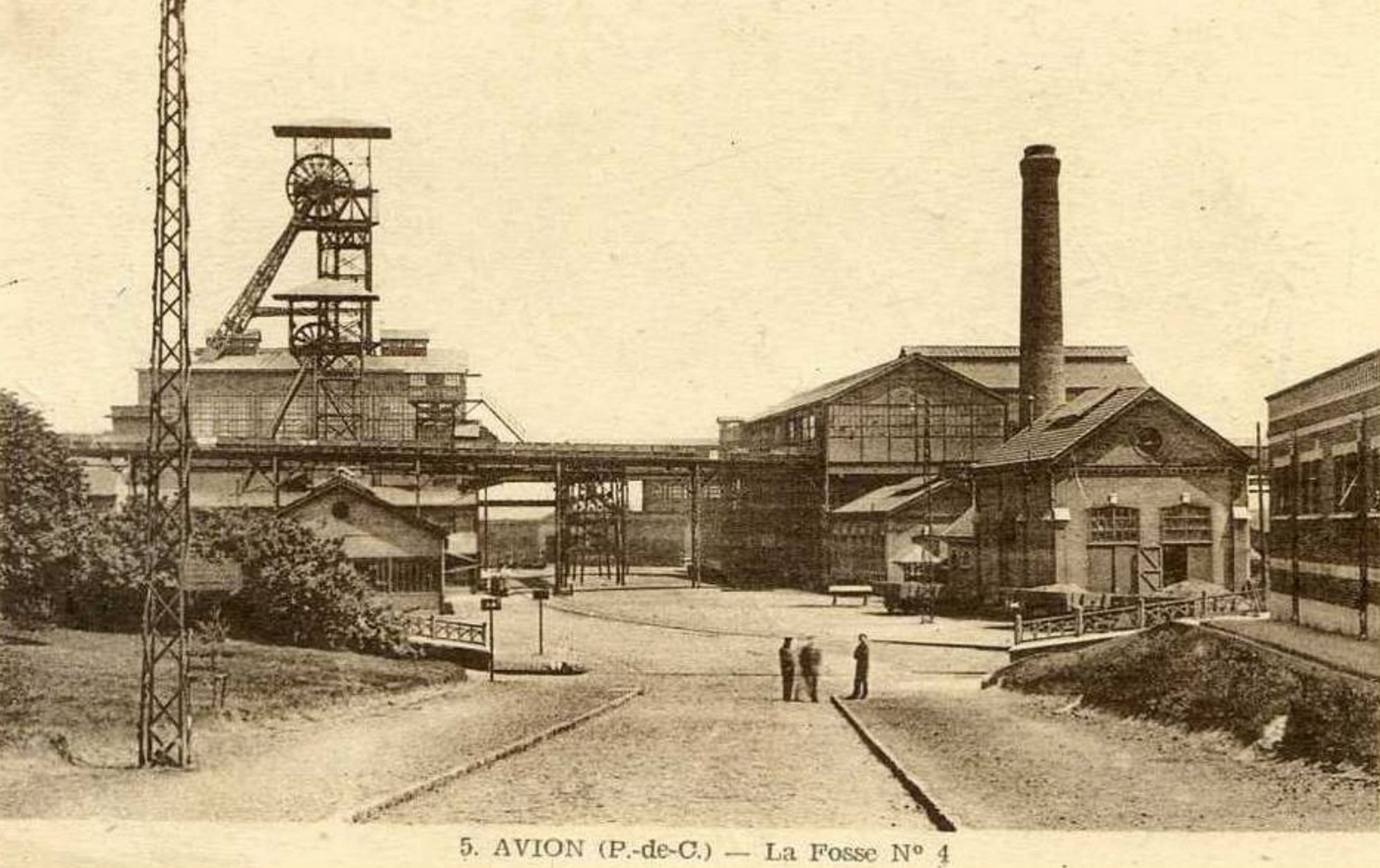 Fosse n° 4 - 4 bis de la Compagnie des mines de Liévin, Avion, Pas-de-Calais, Nord-Pas-de-Calais, France.